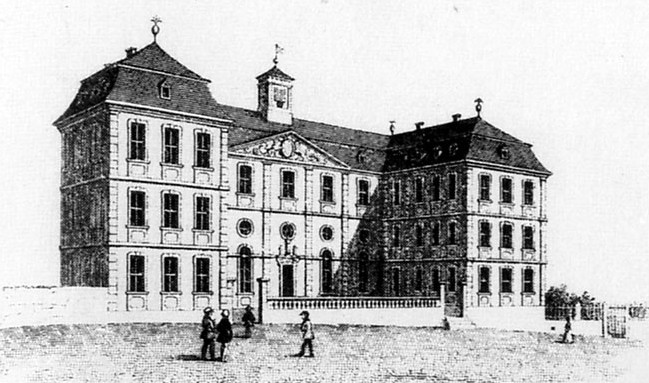 Ansicht der Adolphs-Universität Fulda (auch: Alma Mater Adolphiana)